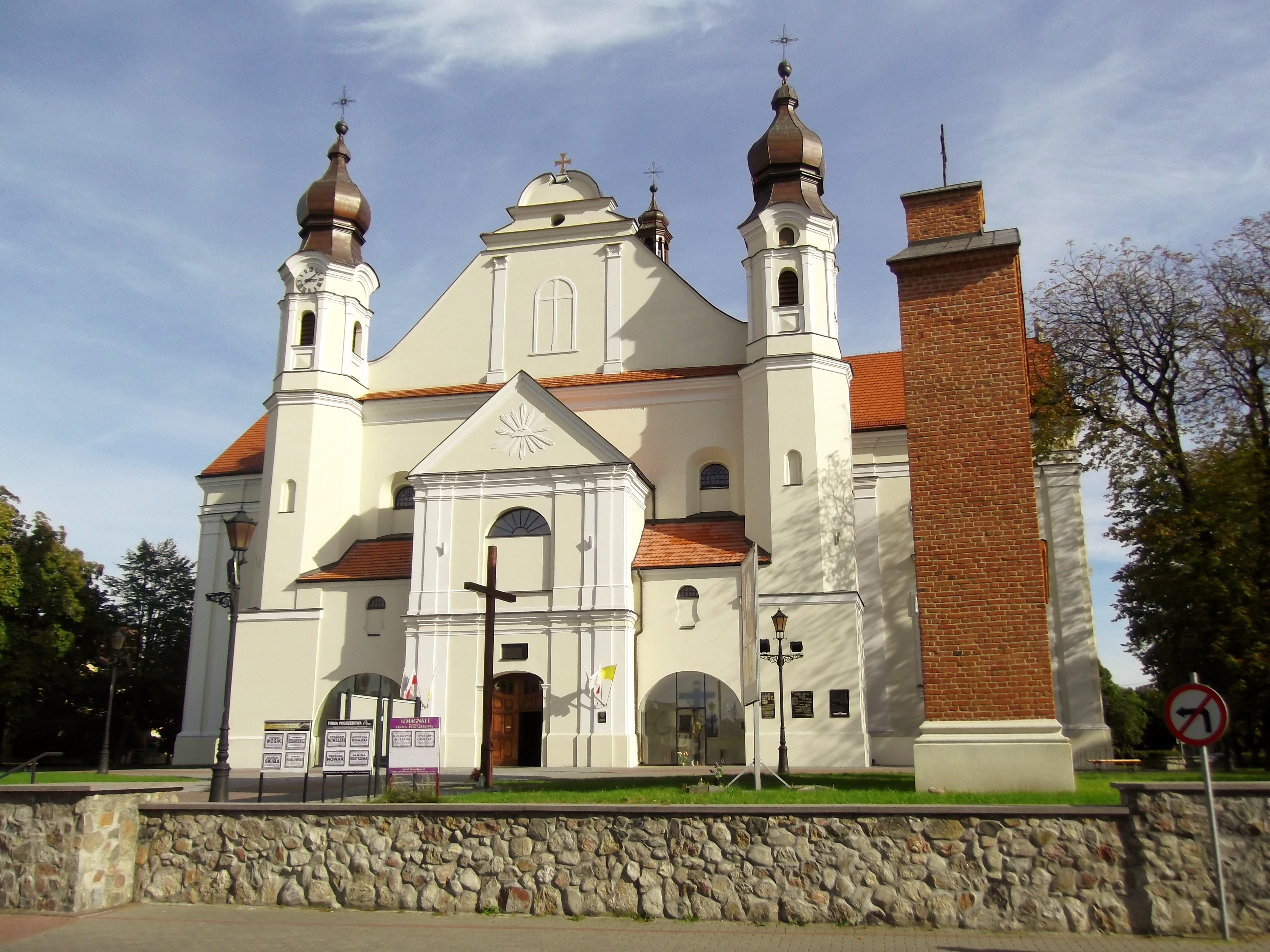 Łask, kościół NMP i św. Michała Archanioła, 1525, XVIII